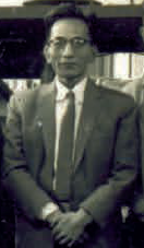 1948年的許雲基